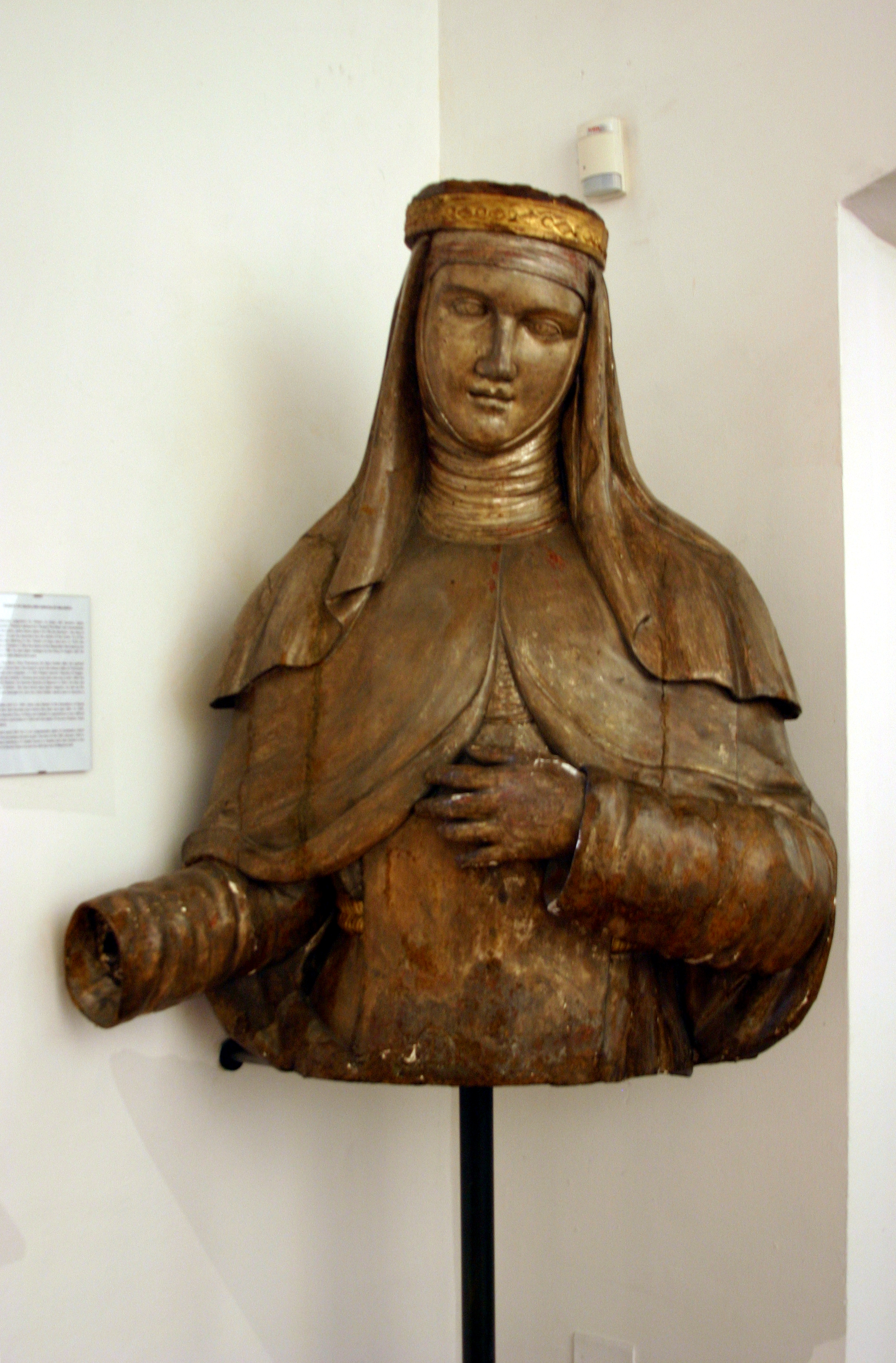 Santa Chiara Museum - Naples